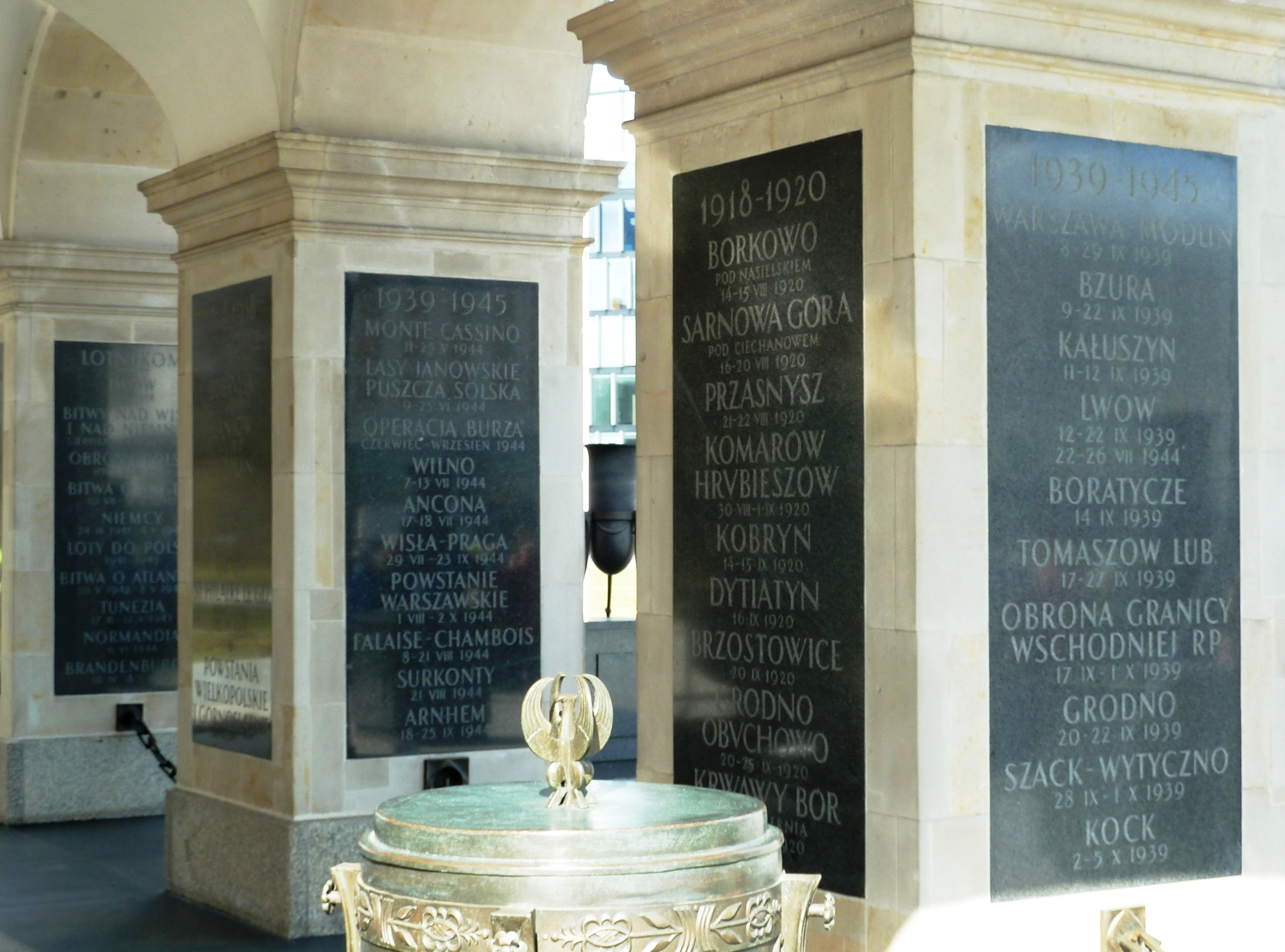 Grób Nieznanego Żołnierza w Warszawie. Na kolumnie pierwszej z prawej tablica, na której upamiętnione zostały Borkowo i Sarnowa Góra - miejsca bitew, w których brała udział 18 Dywizja Piechoty w 1920 r.